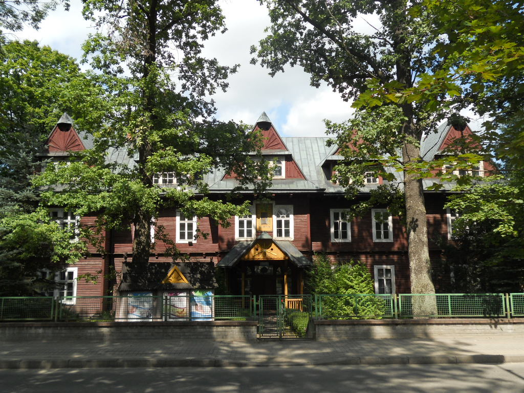 Willa Pod Św. Józefem w Rabce-Zdroju przy ulicy Orkana 28.